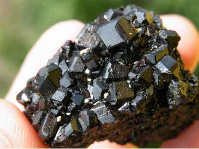 minerał; granat, melanit; pochodzenie Kazachstan; autor zdjęcia Piotr Menducki 10.08.2006